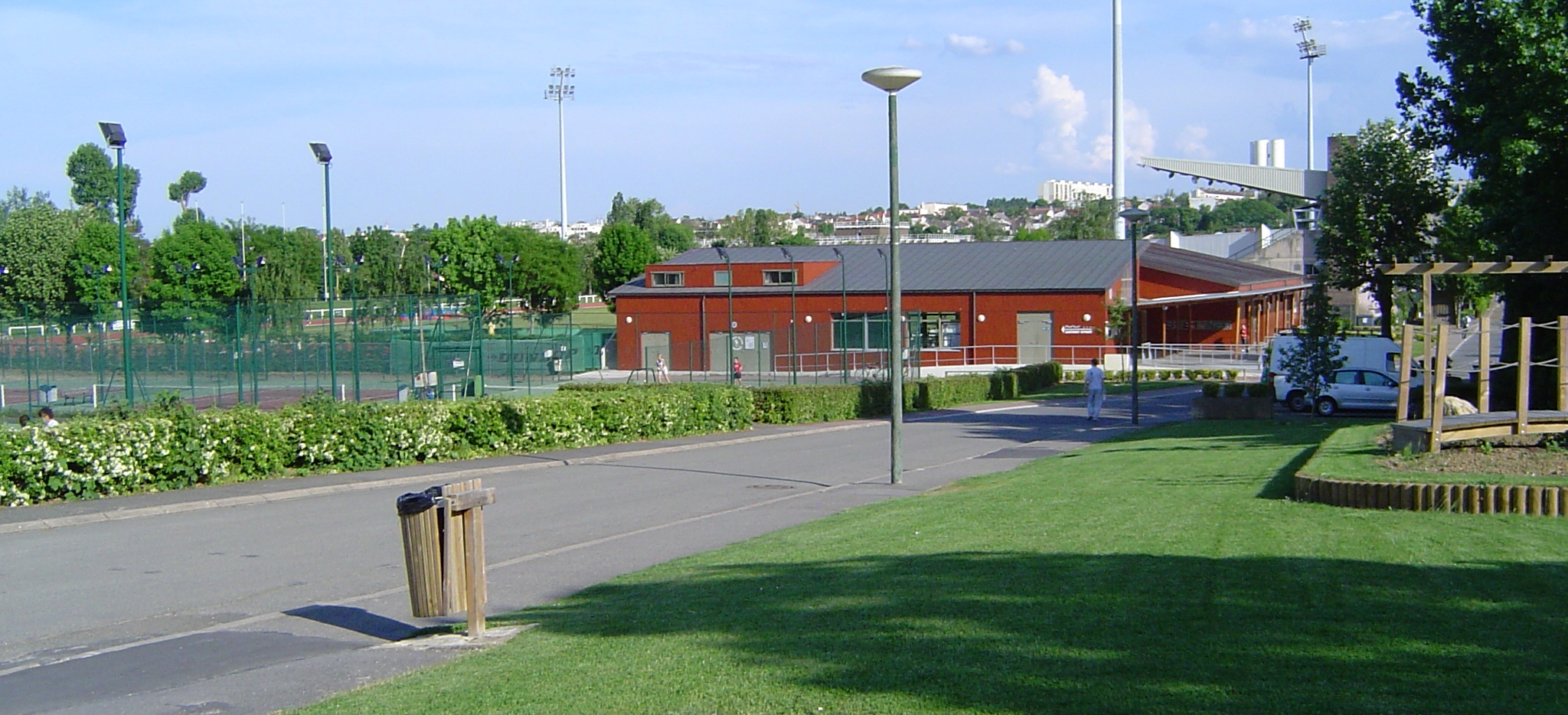 Antony